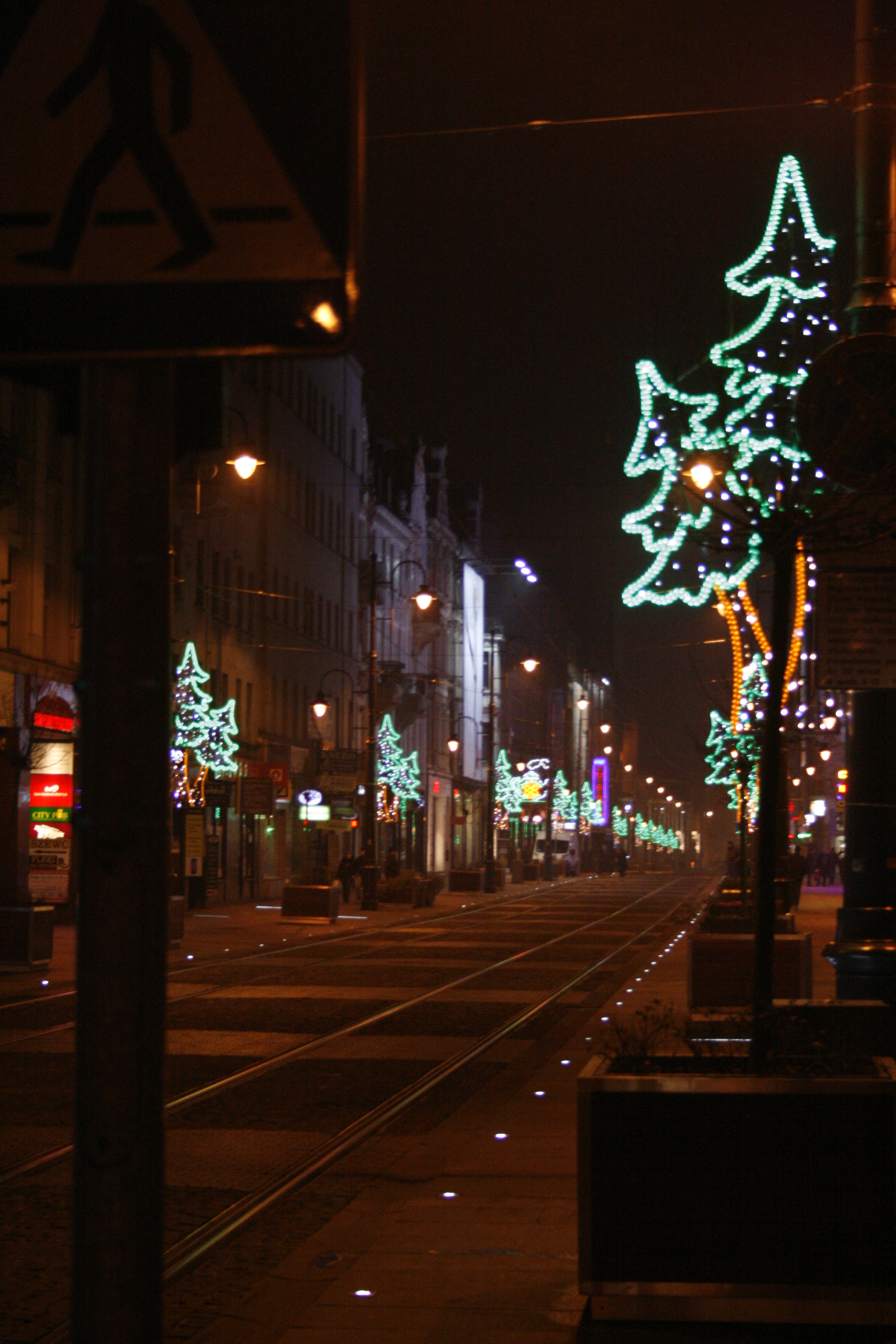 3 maja świątecznie